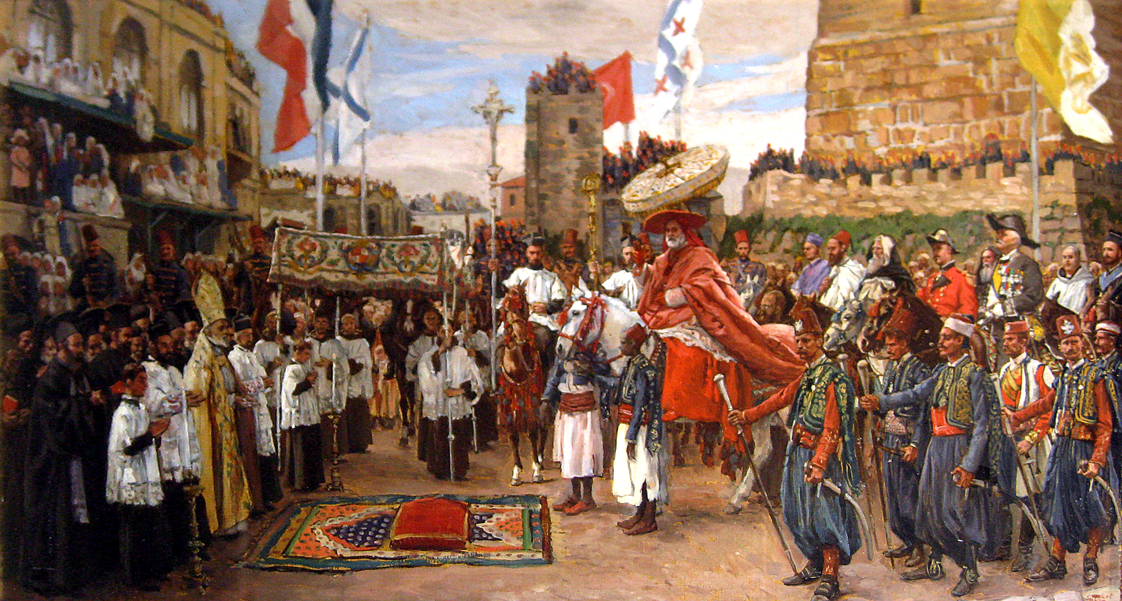 Le patriarche latin de Jérusalem